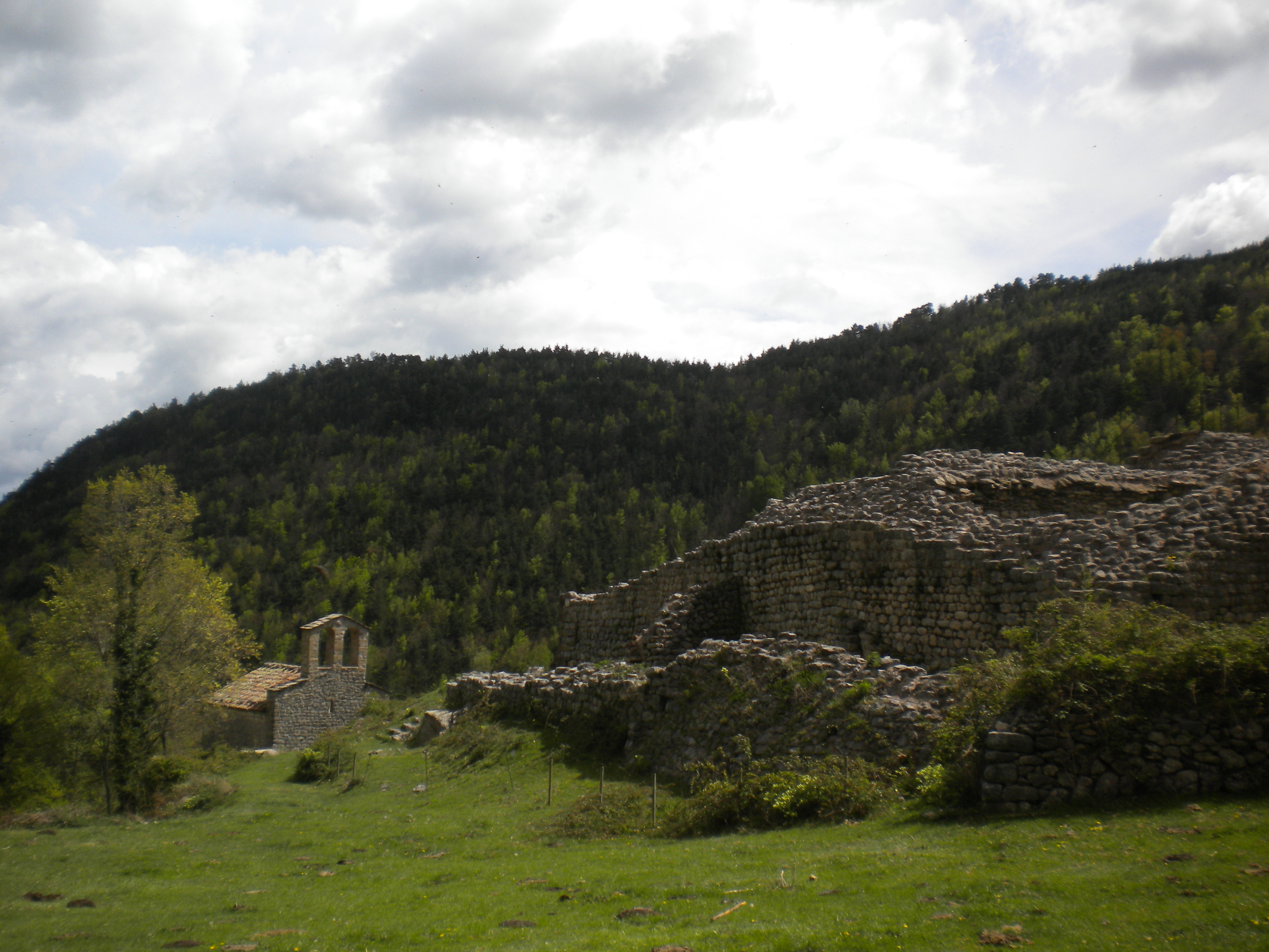 Ruïnes del Castell de Mataplana amb l'església romànica de Sant Joan de Mataplana al fons, dins del terme municipal de Gombrèn, al Ripollès.